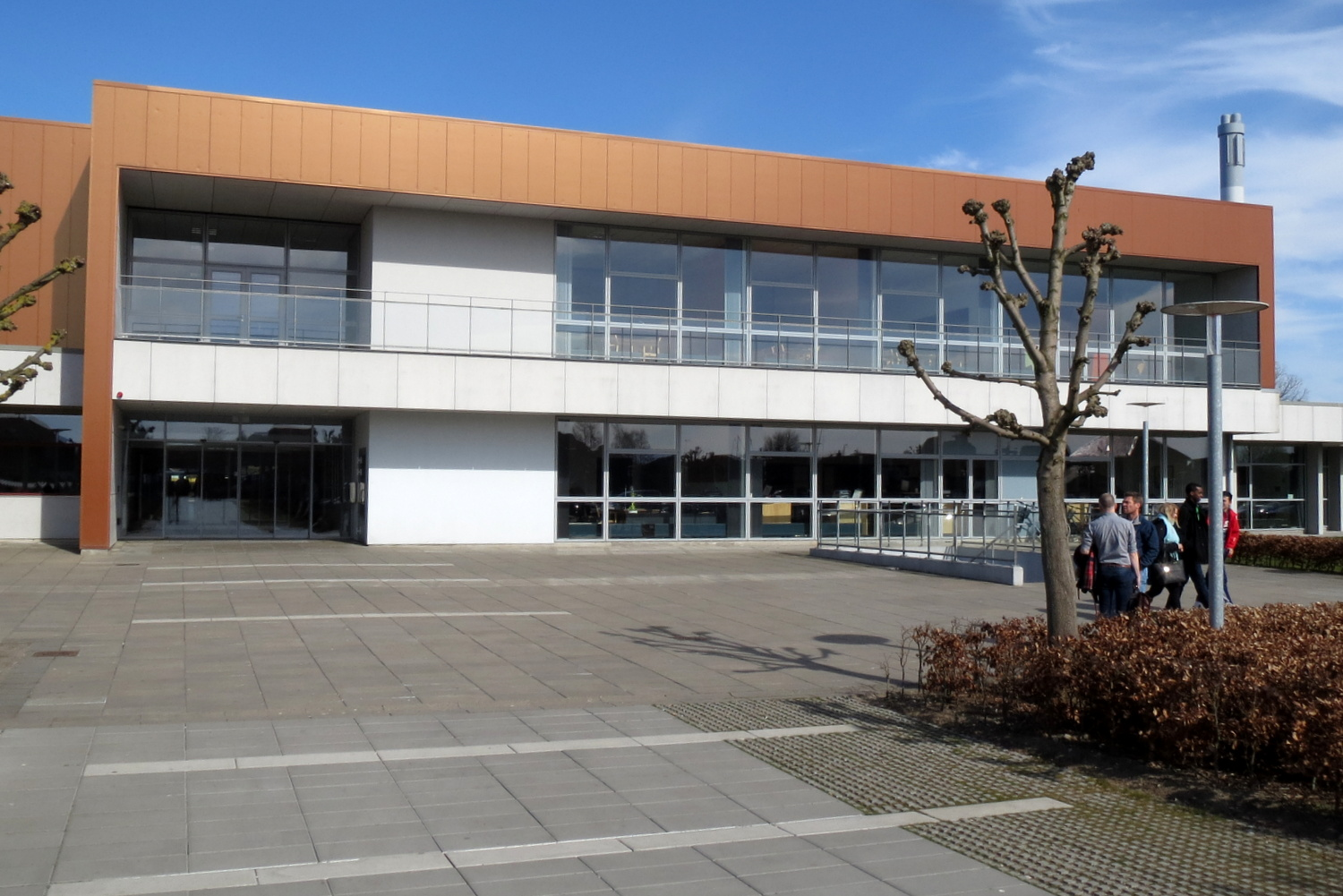 Indgangsparti